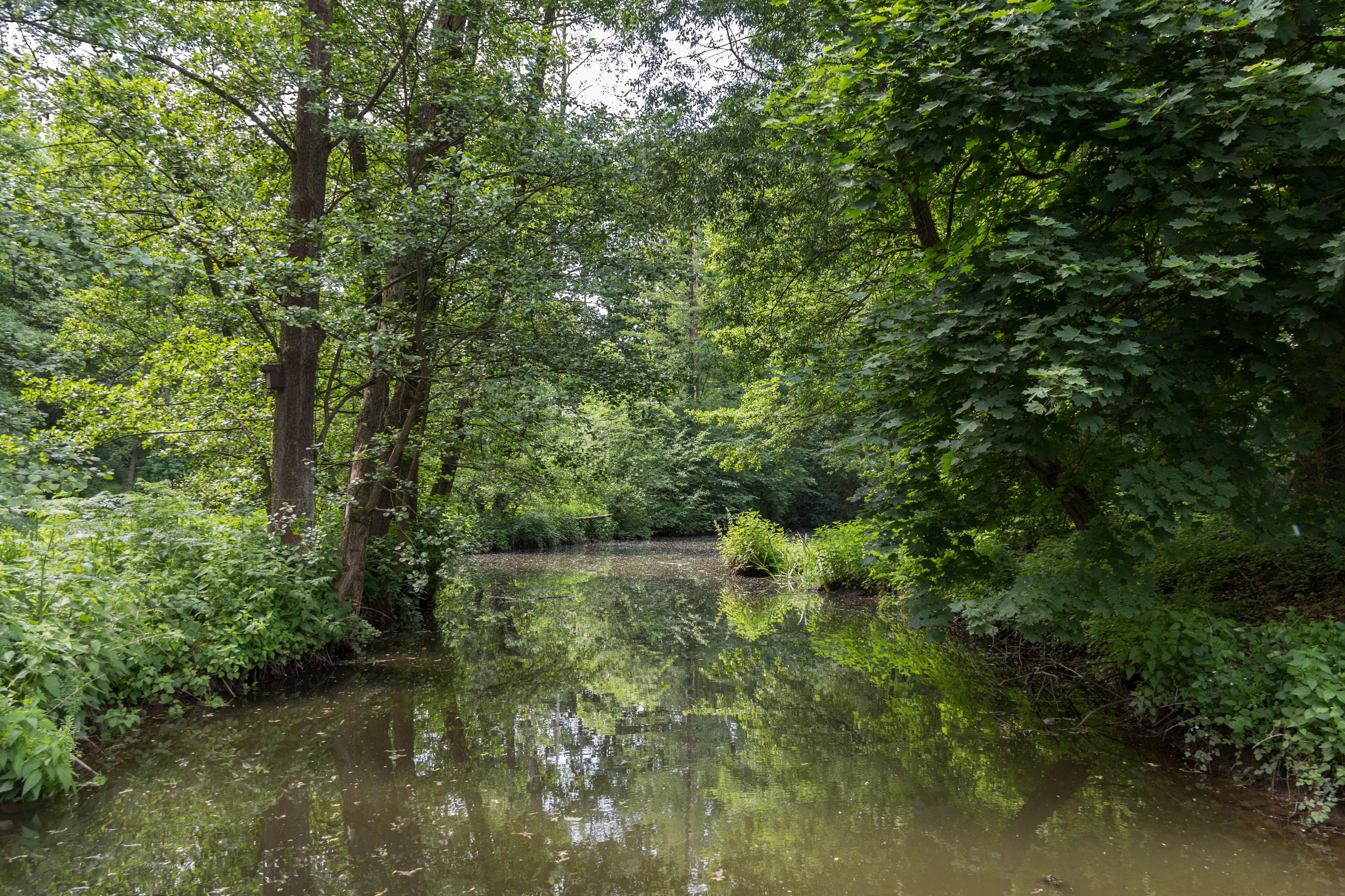 Rednitztal zwischen Katzwang und Wolkersdorf, LSG Rednitztal - Süd, FFH-Gebiet Rednitztal in Nürnberg